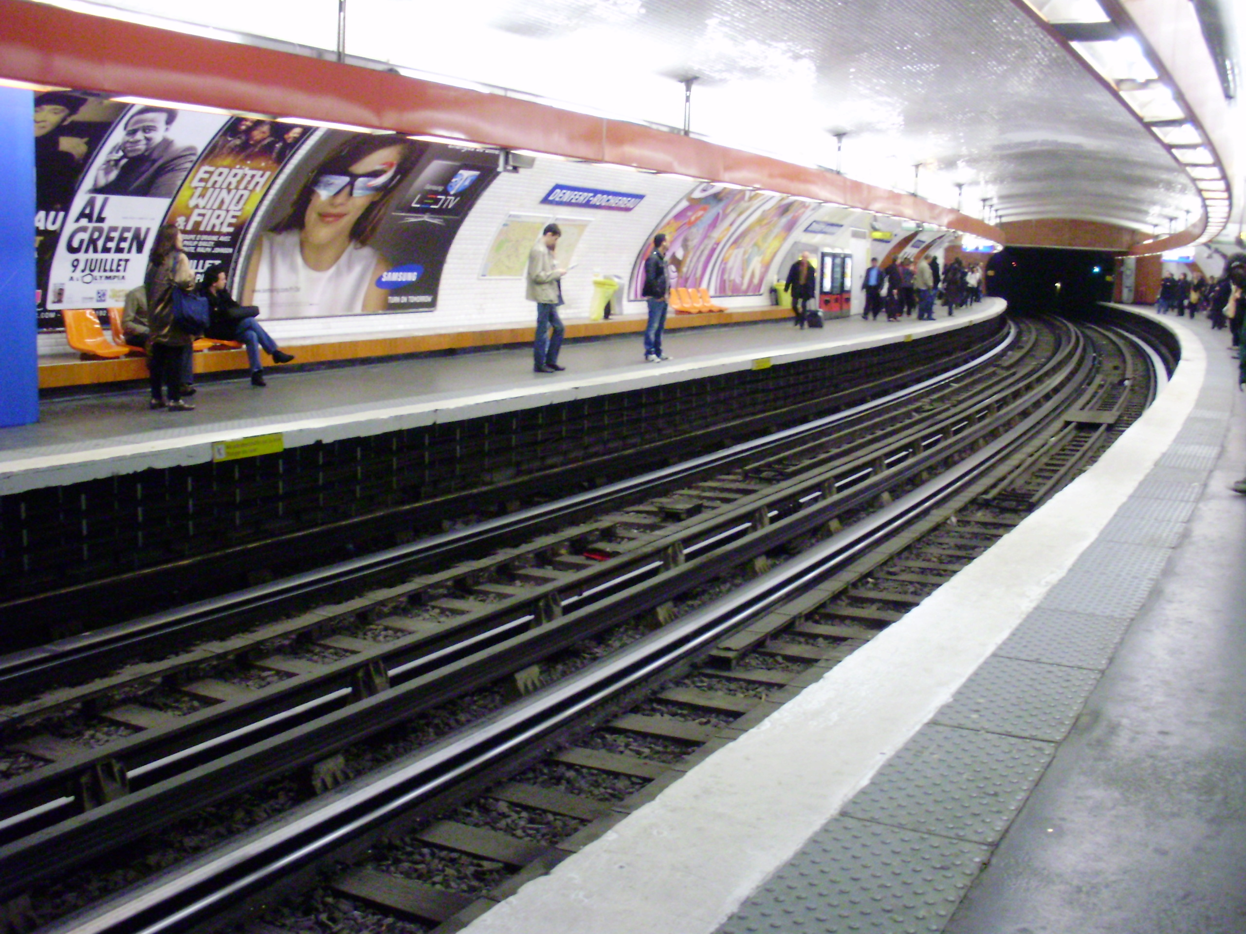 Quai de la ligne 6 de la station Denfert-Rochereau du métro de Paris